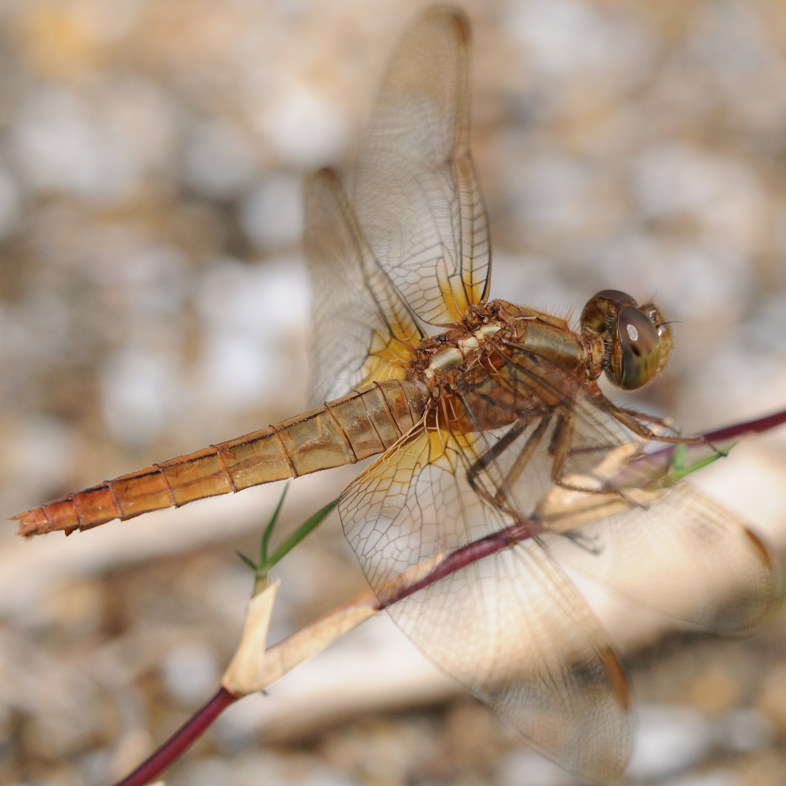 ショウジョウトンボ雌 広島県